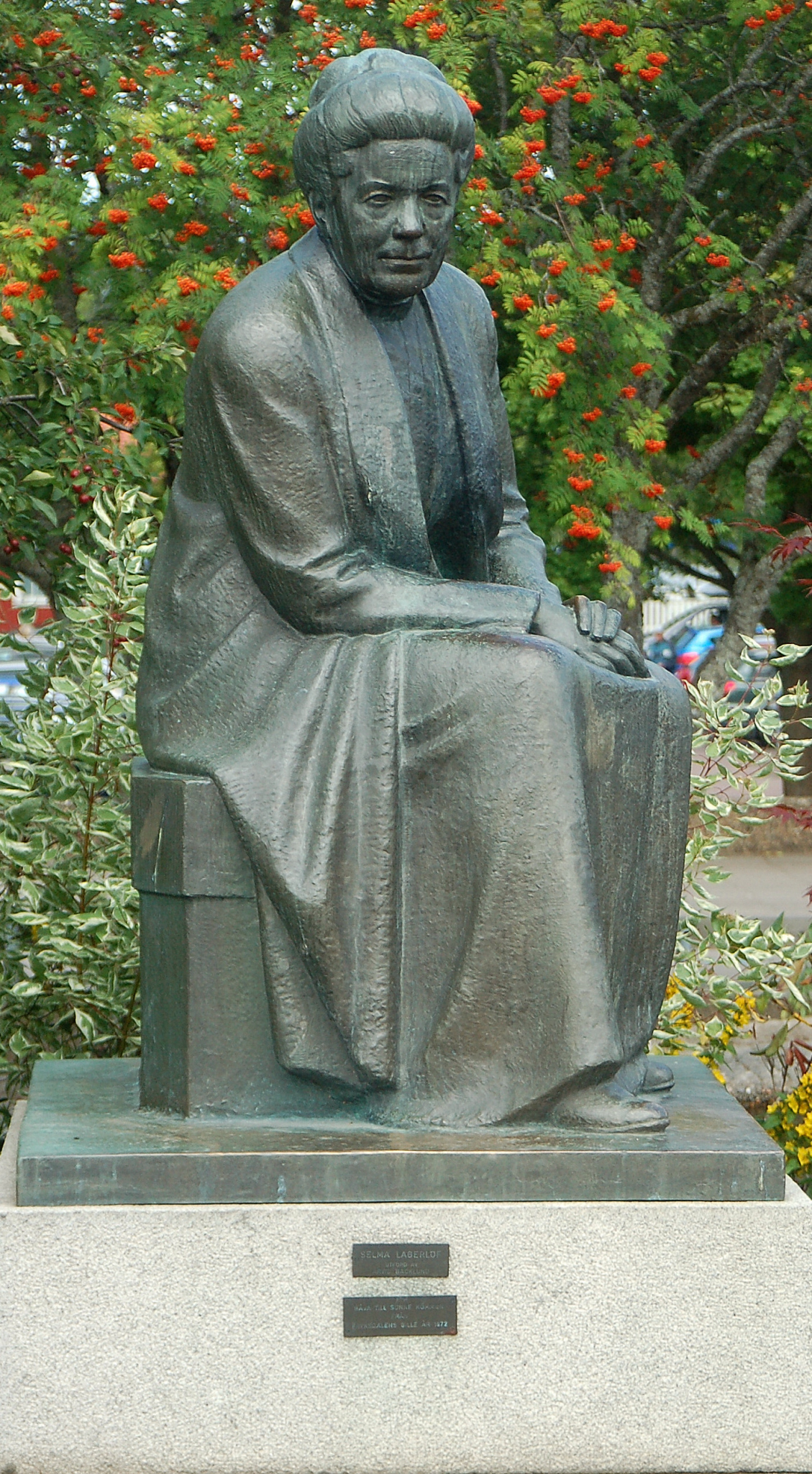 Arvid Backlunds skulptur Selma Lagerlöf placerad i Sunne, Värmland, Sverige, rest 1972